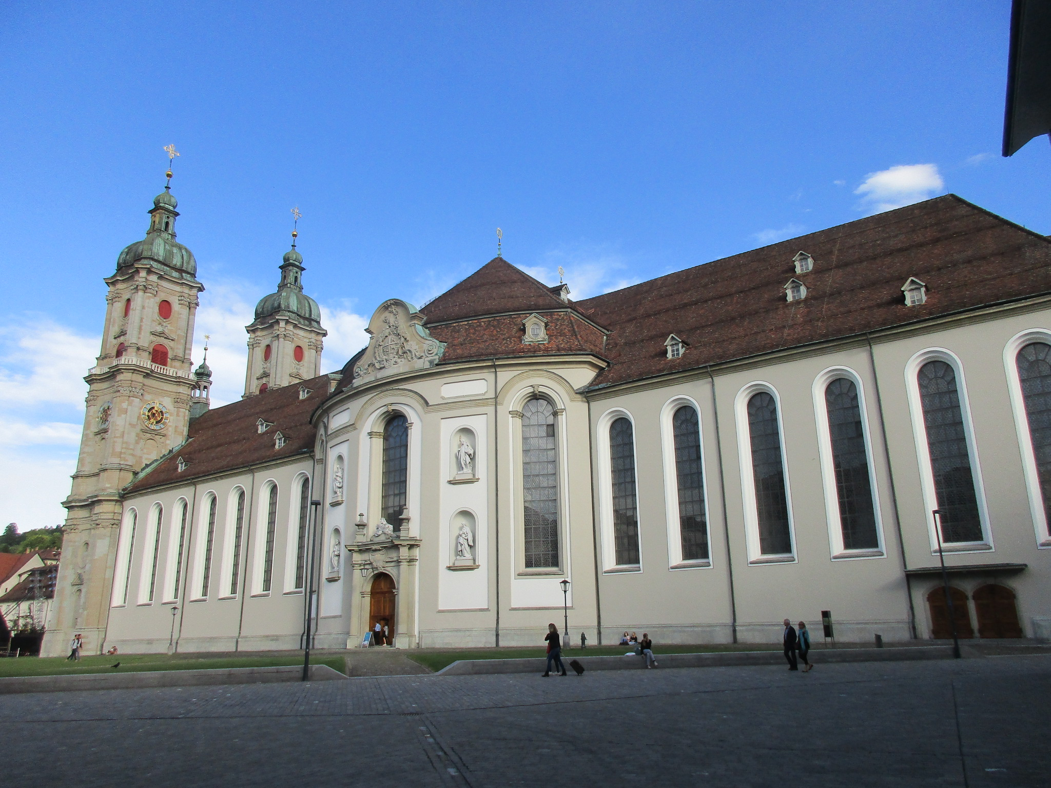 Exterior of Stiftskirche St. Gallus und Otmar (St. Gallen)